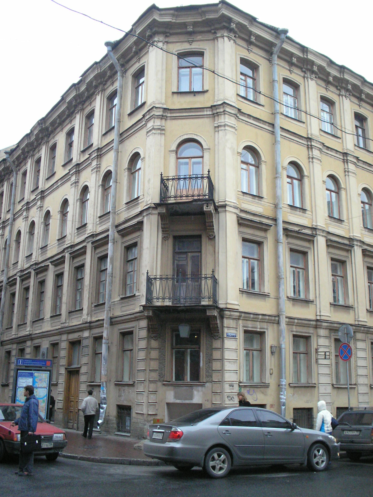 Дом в Санкт-Петербурге, в котором была квартира Федора Достоевского, а ныне там находится музей Ф.М. Достоевского. Кузнечный переулок 5/2.